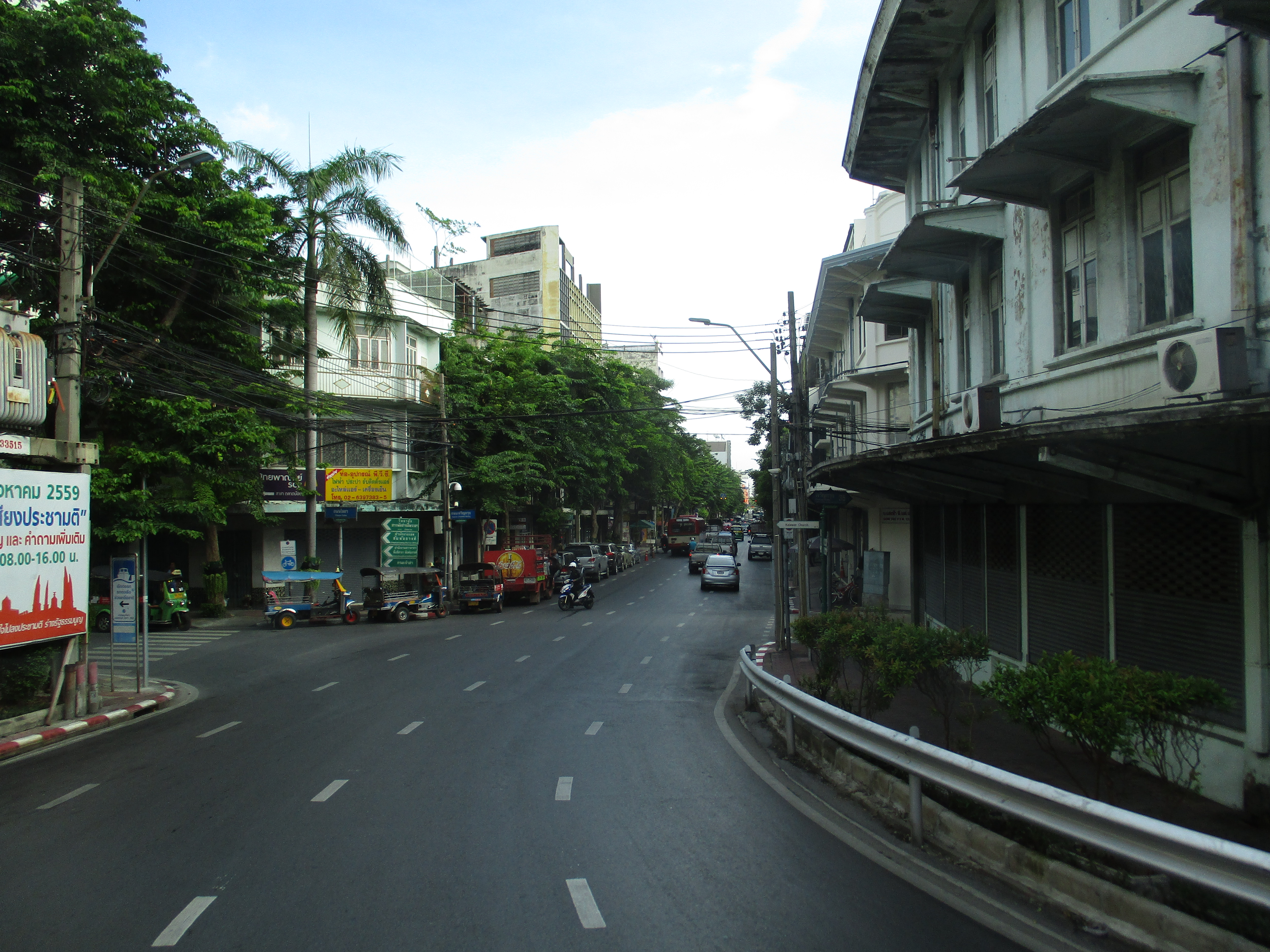 Jalan di Kota Bangkok